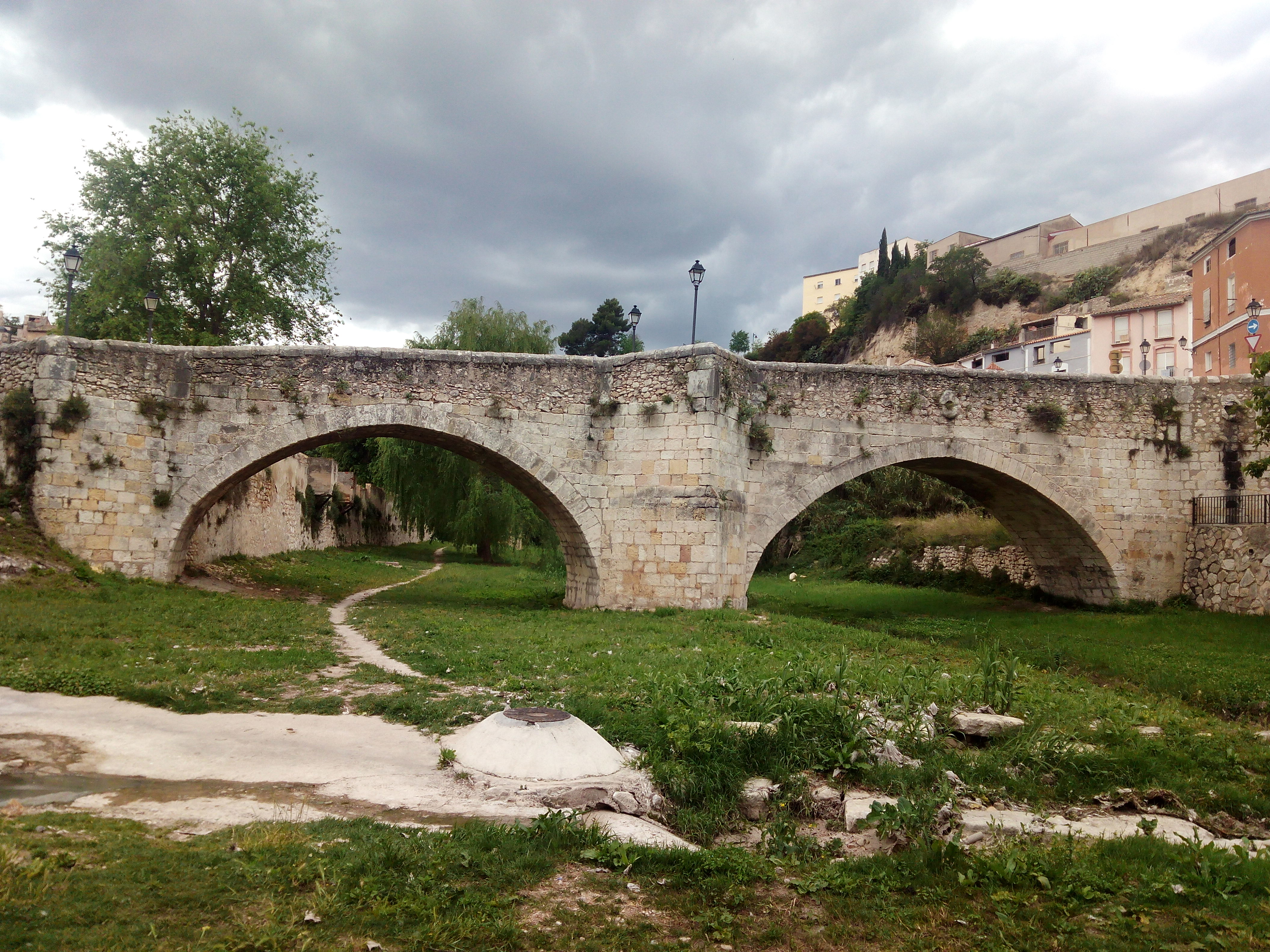 Puente Viejo de Onteniente 24.184-018.